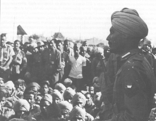 Il Battaglione "Azad Hindoustan" (in lingua hindi: "India libera") fu un reparto composto da personale indiano operante nelle fila del Regio Esercito nel 1942 ed inquadrato nel Raggruppamento centri militari.